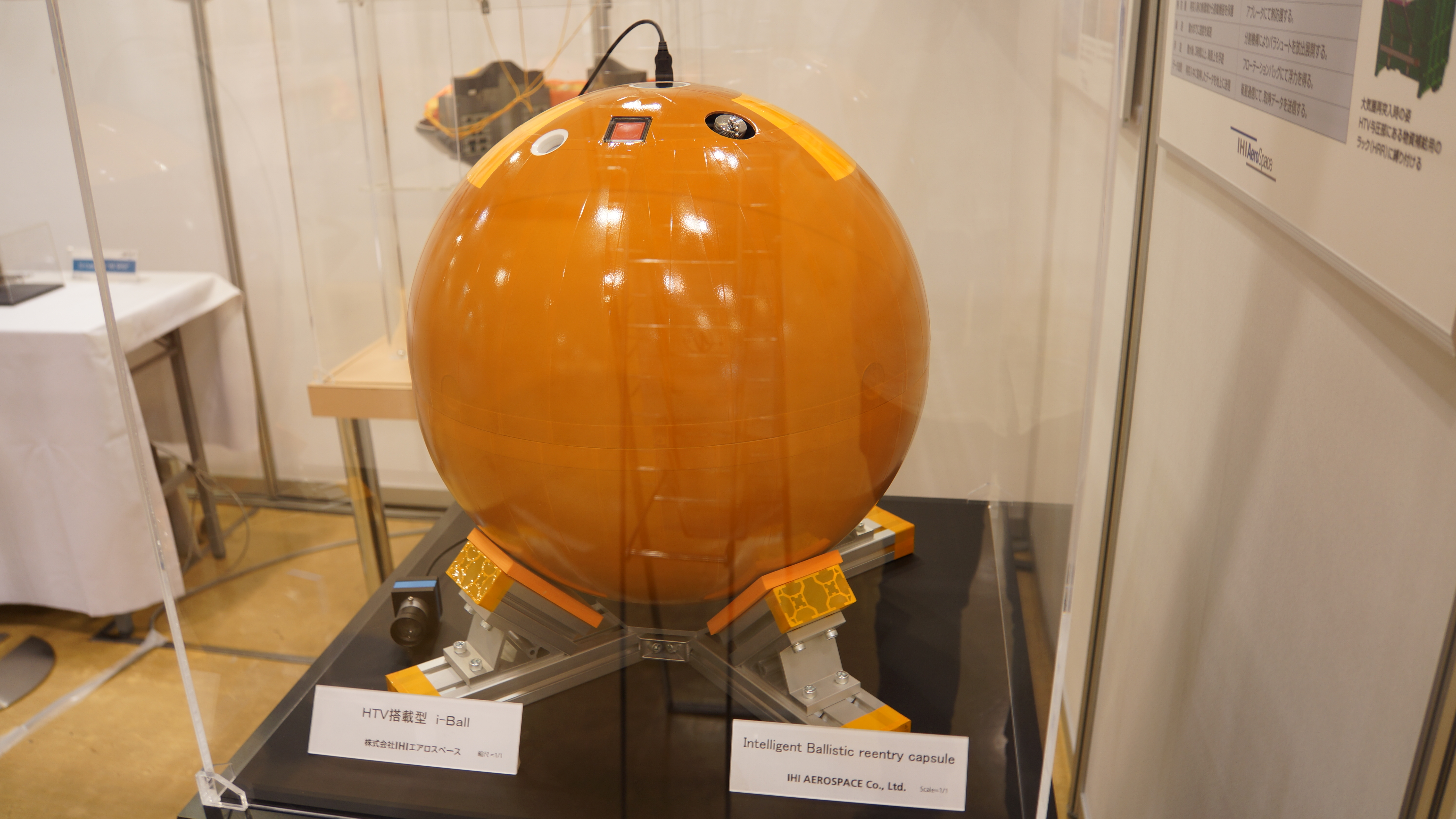 再突入データ収集装置「i-Ball」（1/1スケール）。 15年7月4日 神戸国際会議場でのHYOGO-KOBE 宇宙博にて。